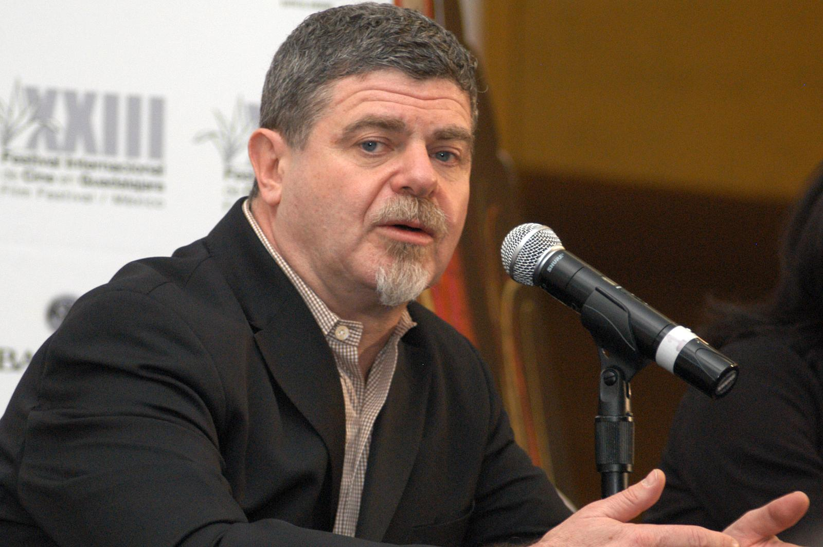 Guadalajara, Jalisco Marzo 7 de 2008 El Musico y productor Argentino Gustavo Santaolalla durante la rueda de prensa previa a su homenaje.